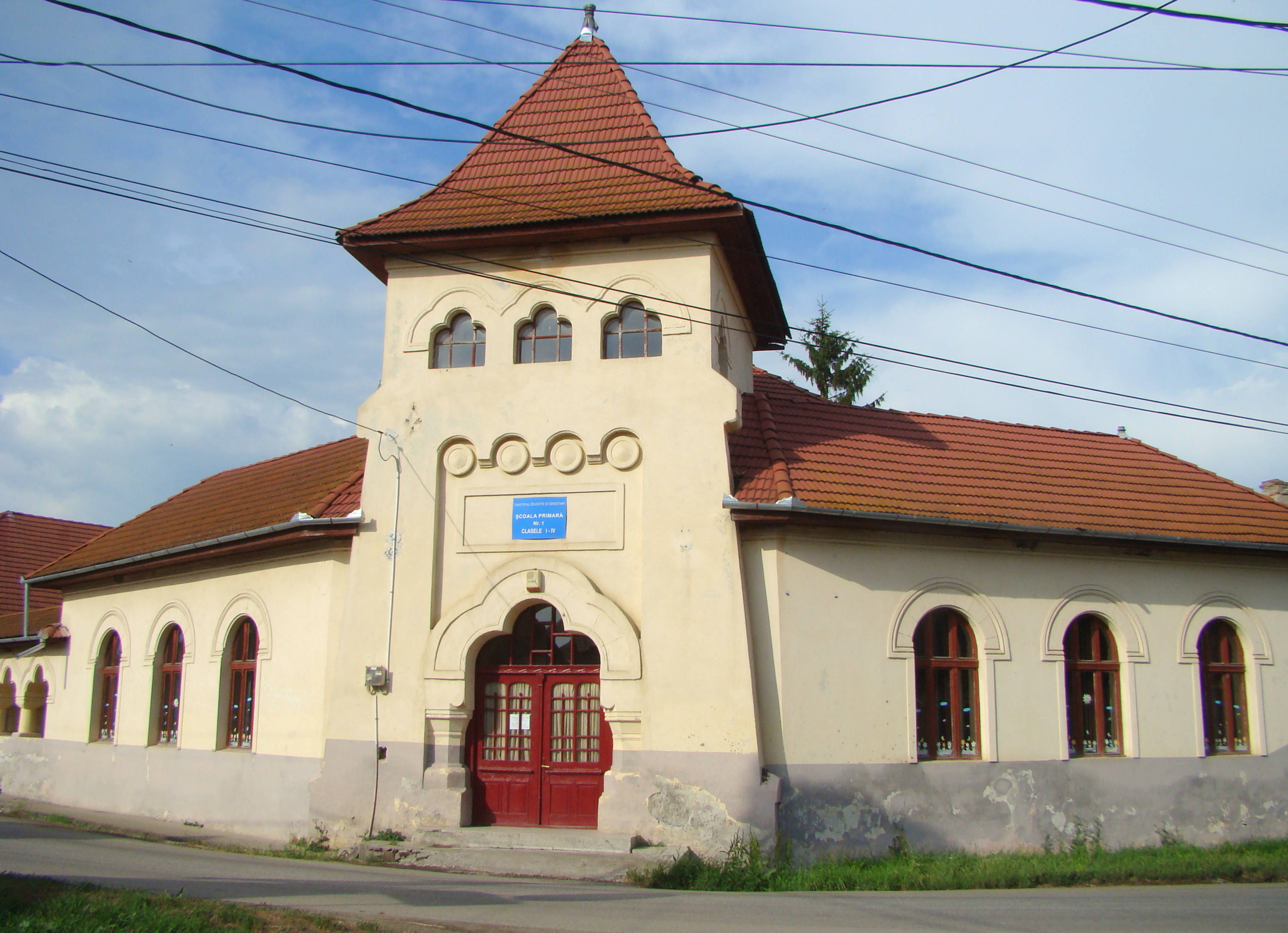 Fosta școală românească, sat Cața; comuna Cața, str. Românilor 170- A 1936